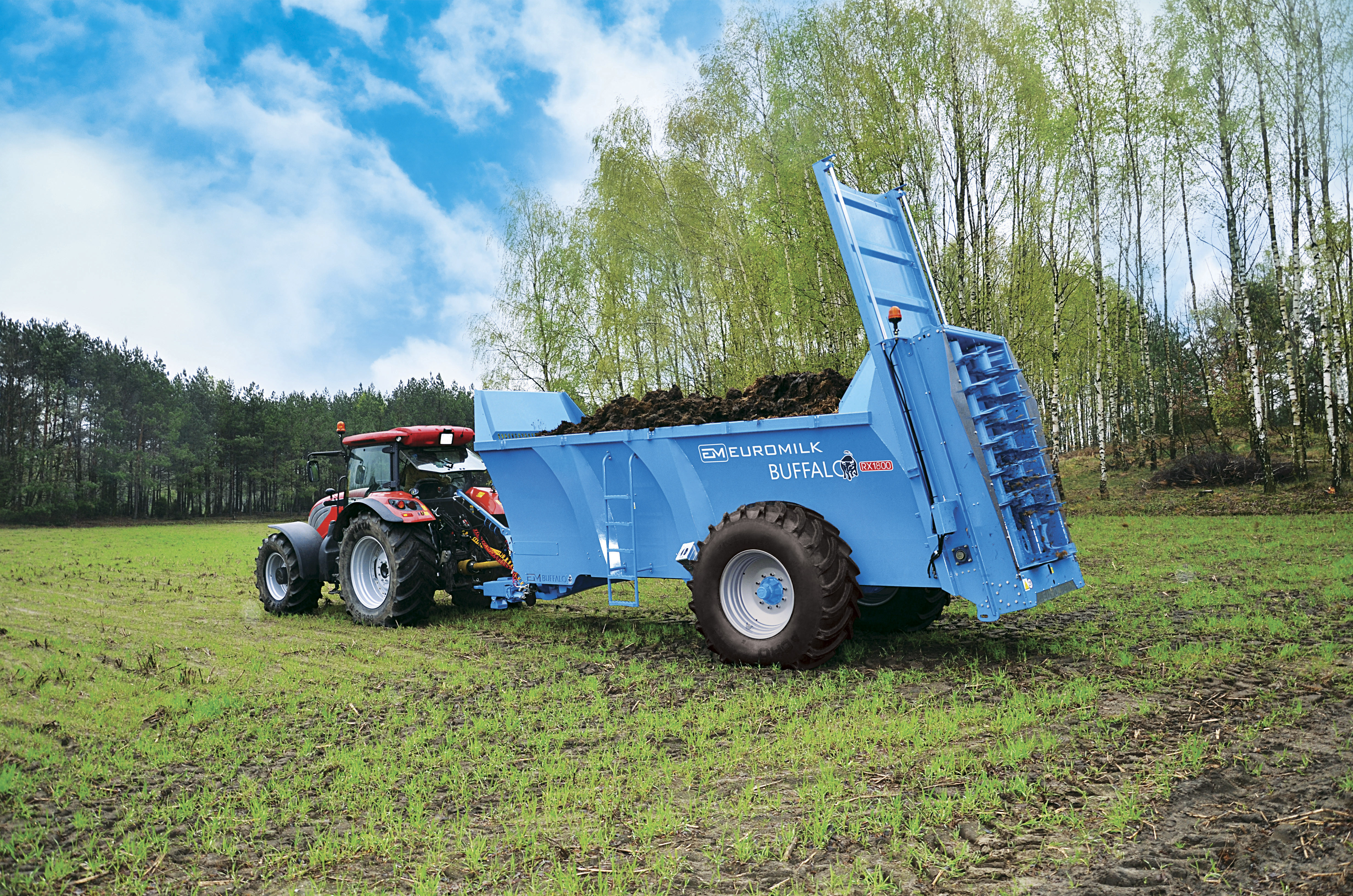 Rozrzutnik obornika polskiego producenta EUROMILK Buffalo model RX1600 podczas pracy